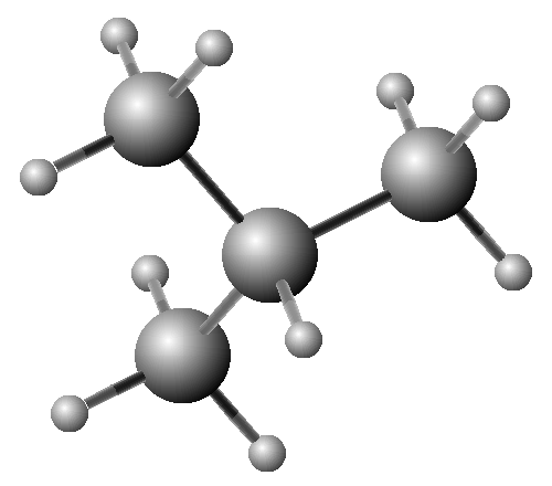 Prostorová geometrie molekuly isobutanu (2-methylpropanu)